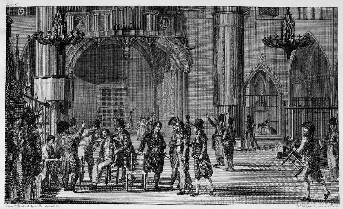 Detenciones en la Catedral.